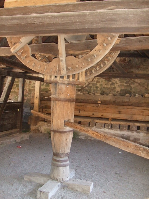 Heilig-Geist-Spital, Dinkelsbühl historische Walk-Anlage einer Färberei aus dem 18. Jahrhundert, im Areal des Spitals